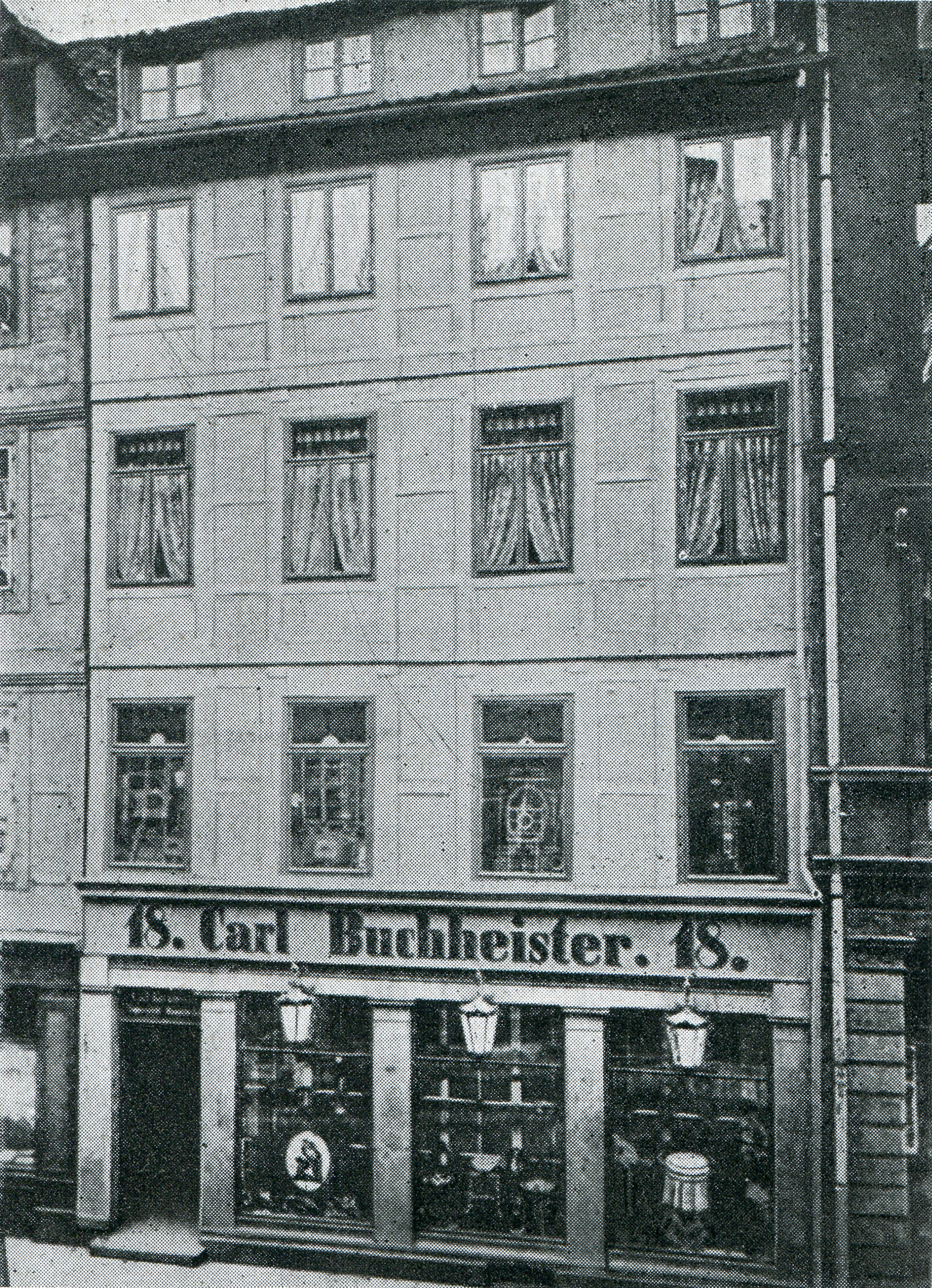 Das "Spezial-Geschäft für Handarbeiten und Hauskunst" „Carl Buchheister, Tapisserie-Manufactur“ hatte seit seiner Gründung im Jahr 1868 bis zum Jahr 1896 seinen Sitz im Haus Knochenhauerstraße 18 in der Altstadt von Hannover, bevor es in die Grupenstraße 24 übersiedelte ...